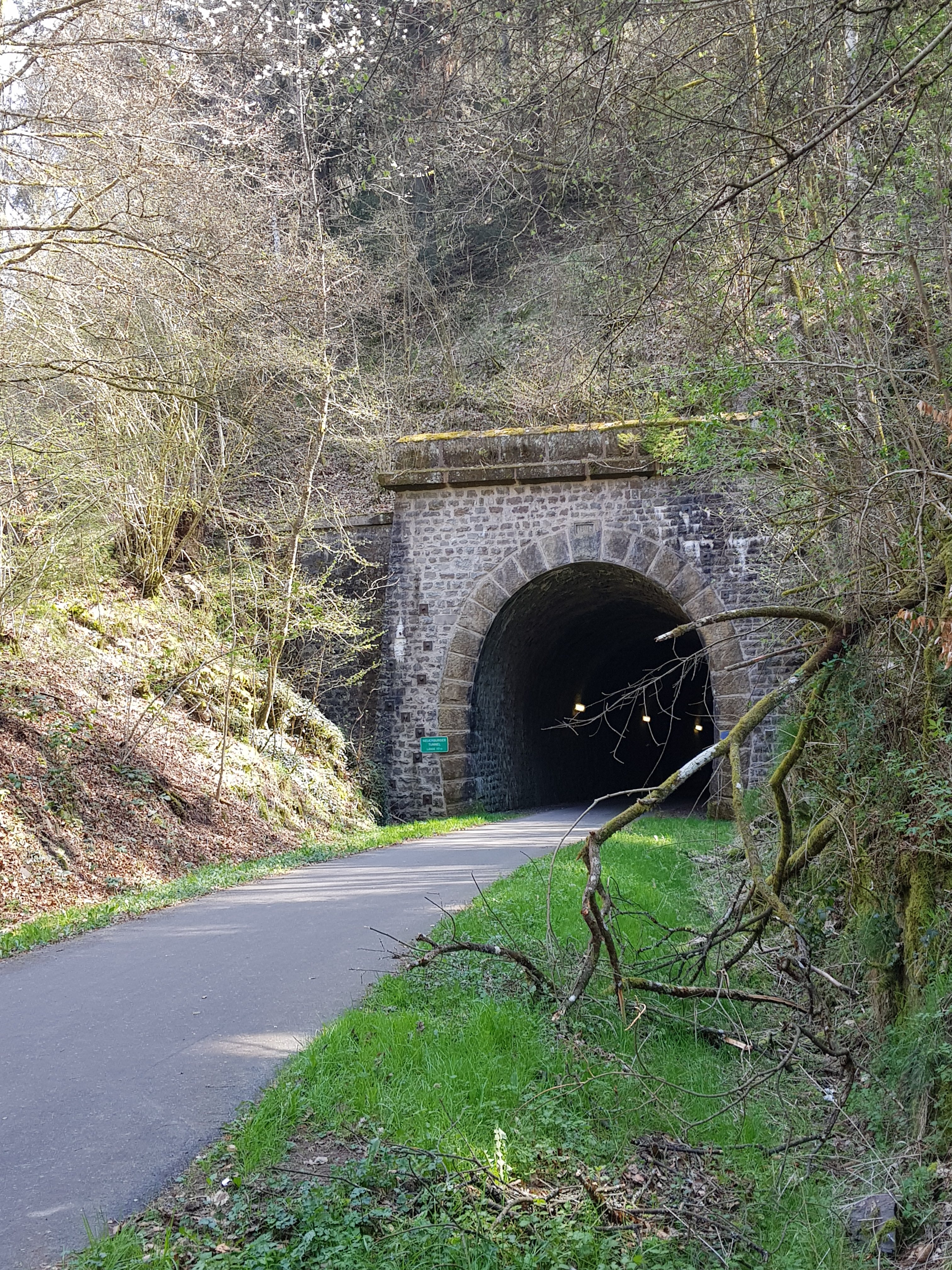 Nordportal des Neuerburger Tunnels mit Bahntrassenradweg